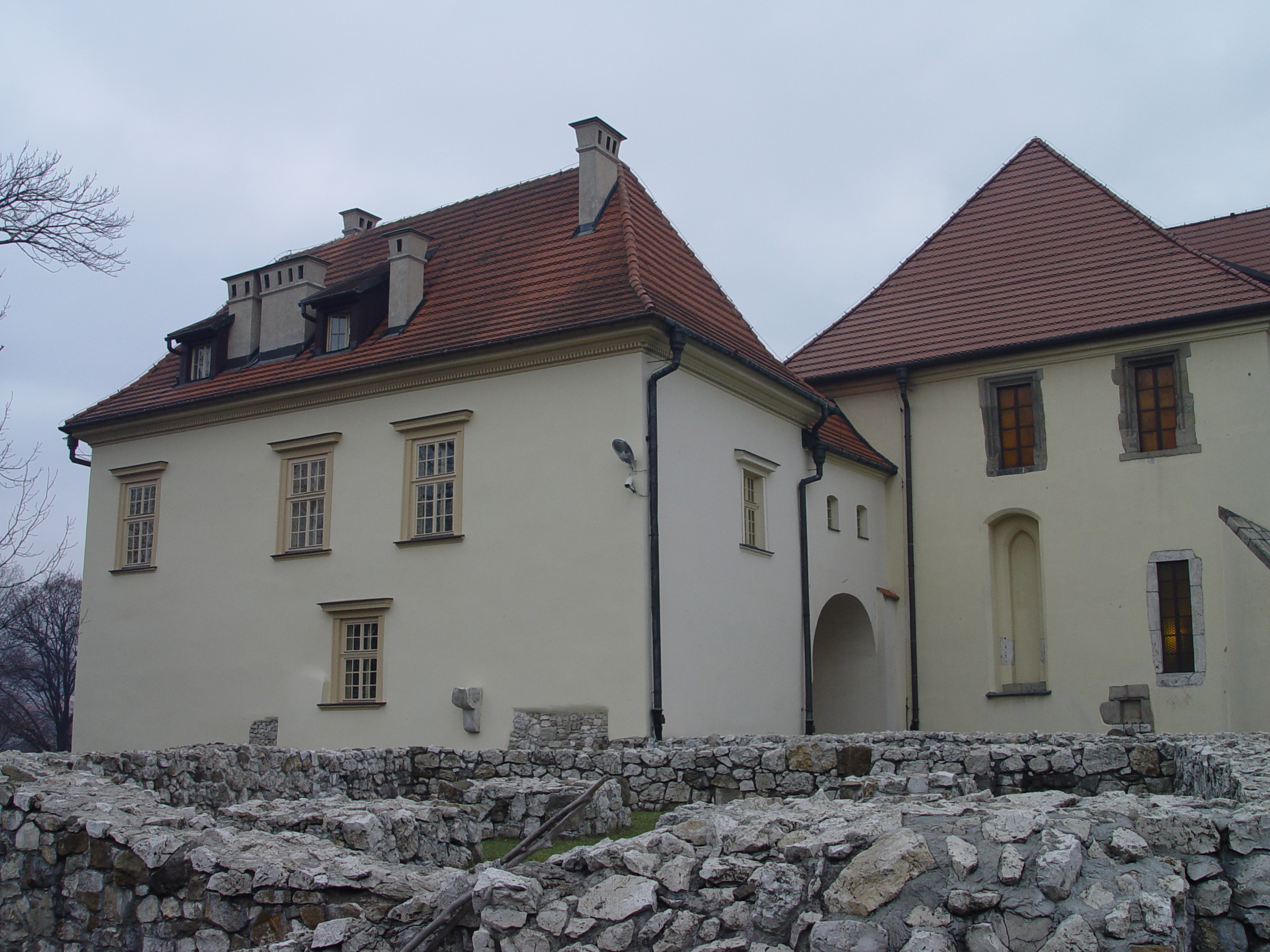 zespół zamku żupnego: dom pośród żupy, dom żupny, relikt muru obwodowego, relikt kuchni zamkowej, wozownia, relikt obwodu obronnego zamku, park zamkowo-żupny, pozostałości miejskiego muru obronnego. Wieliczka.